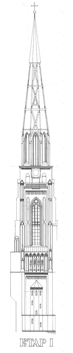 Projekt zabezpieczenia wieży kościoła Mariackiego w Chojnie autorstwa architekta Macieja Płotkowiaka